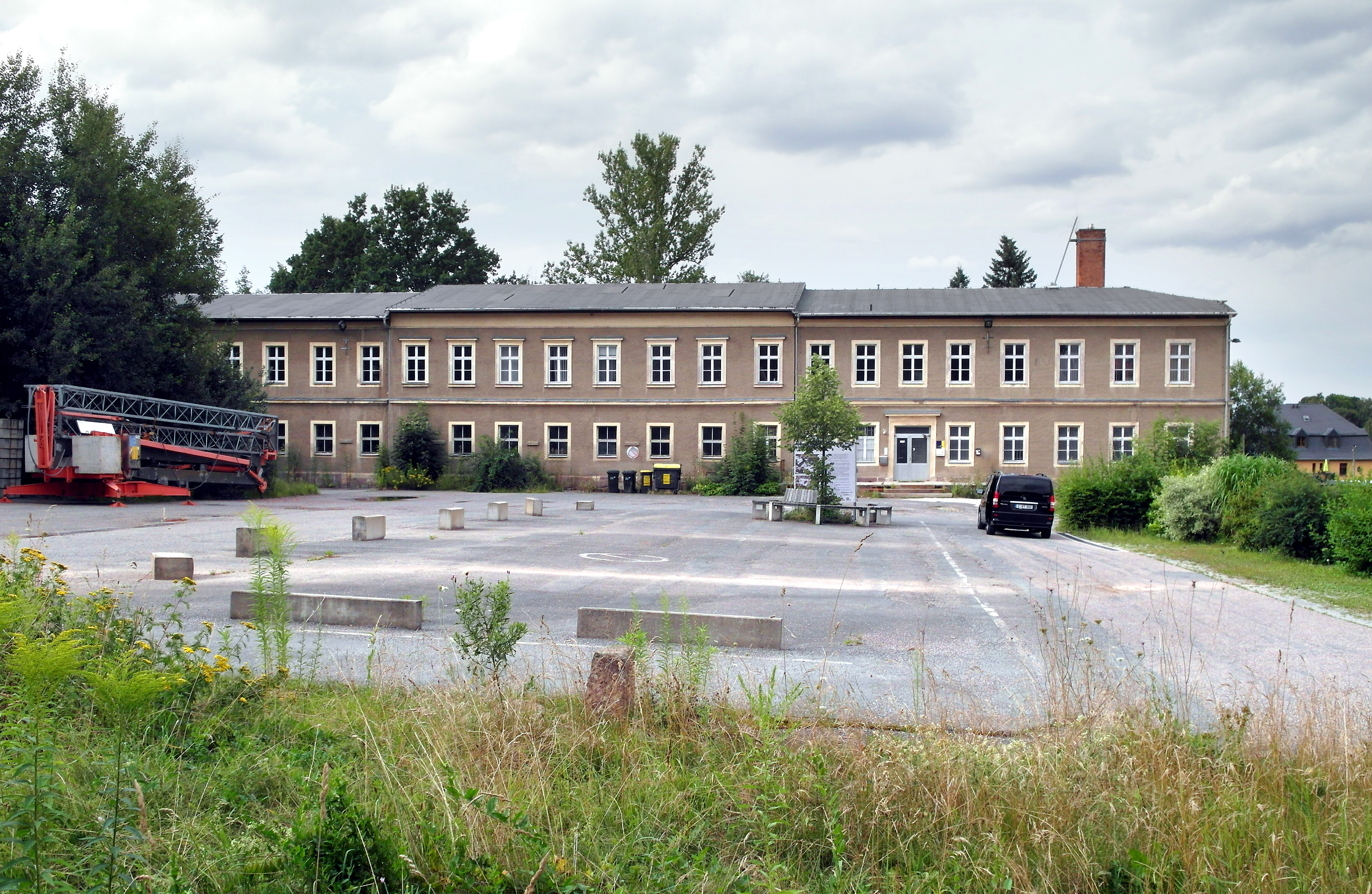 01.08.2016 09117 Rabenstein / Niederrabenstein (zu Chemnitz): Herrenhaus Niederrabenstein, Hofseite. Trützschlerstraße 8. Georg von Carlowitz erwarb 1576 vier Höfe in Niederrabenstein. Das Rittergut entstand dann, als das Dorf Niederrabenstein der Familie als erbliches Lehen übertragen wurde. 1686 wurde die Herrschaft Niederrabenstein verkauft. 1831 erwirbt der Limbacher Kaufmann u. Fabrikant Traugott Reinhold Esche das Rittergut Niederrabenstein und läßt 1834 das Herrenhauses erbauen. 1980 brennt das hohe Dach mit Dachreiter und Gaupen ab und wird durch das heutige flachgeneigte Nordach ersetzt. Die Sanierung des Herrenhauses ist vorgesehen. [SAM7480.JPG]20160801885DR.JPG(c)Blobelt